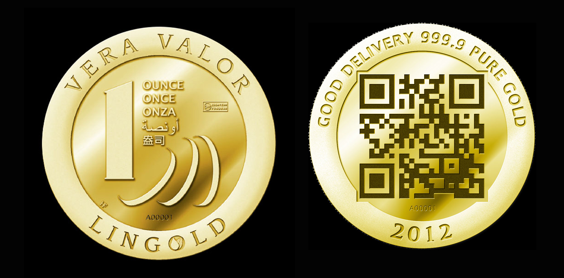 Avers et Revers de la pièce "Vera Valor"